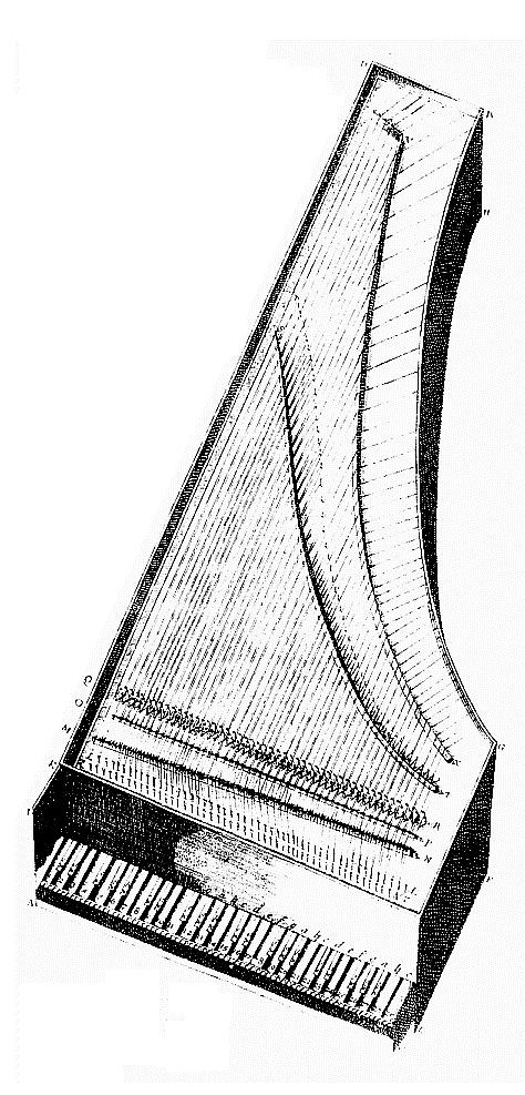 Illustration tirée de l'Harmonie Universelle (Marin Mersenne - 1636)